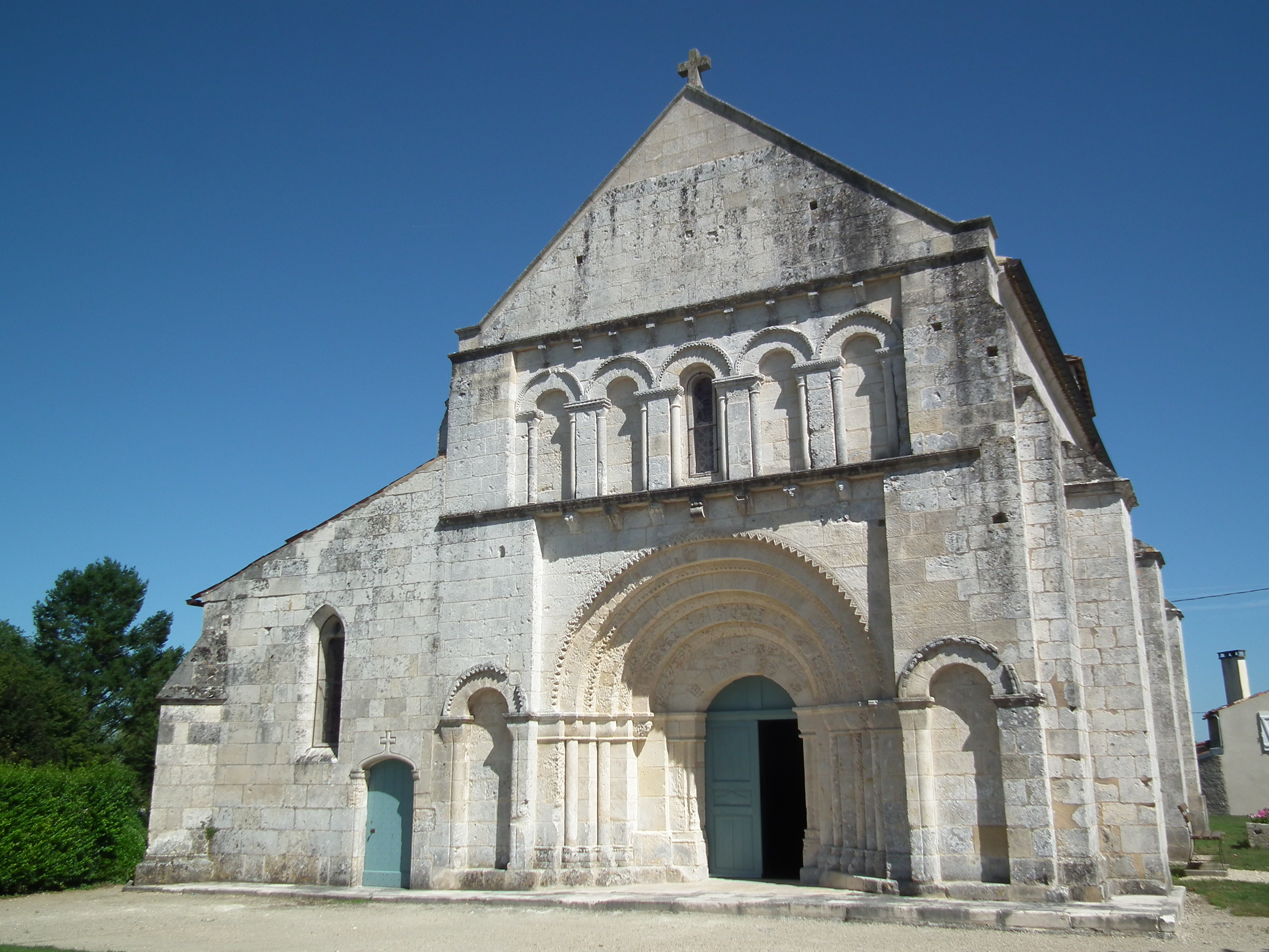 L'église Saint-Saturnin de Mosnac-sur-Seugne